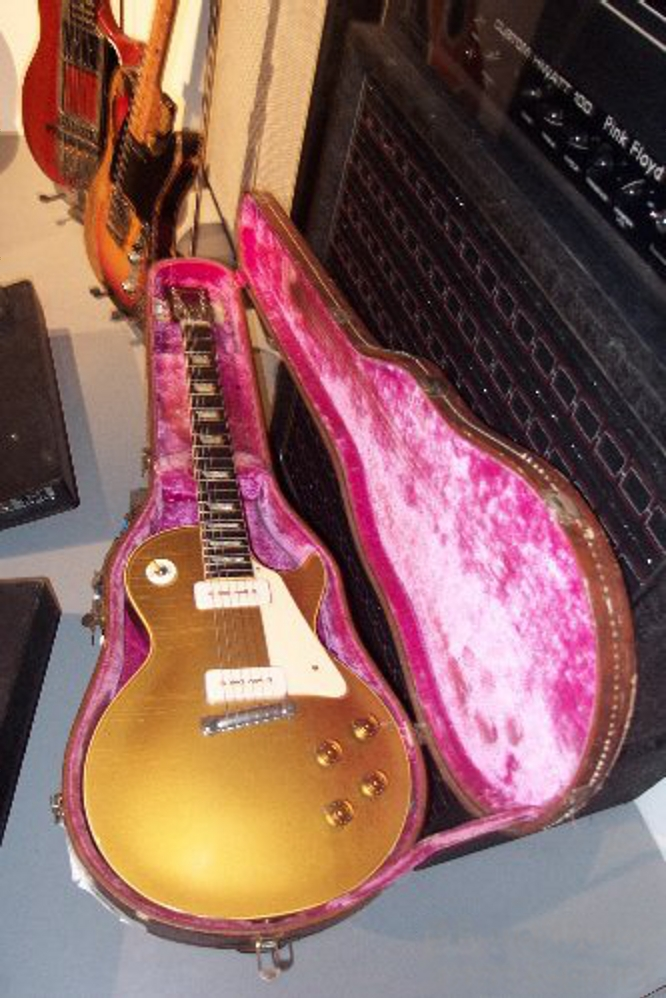 Photos de l'exposition "Pink Floyd Interstellar" à la Cité de la Musique (Porte de la Villette, Paris). Read the story at . Lire le compte-rendu de l'expo sur